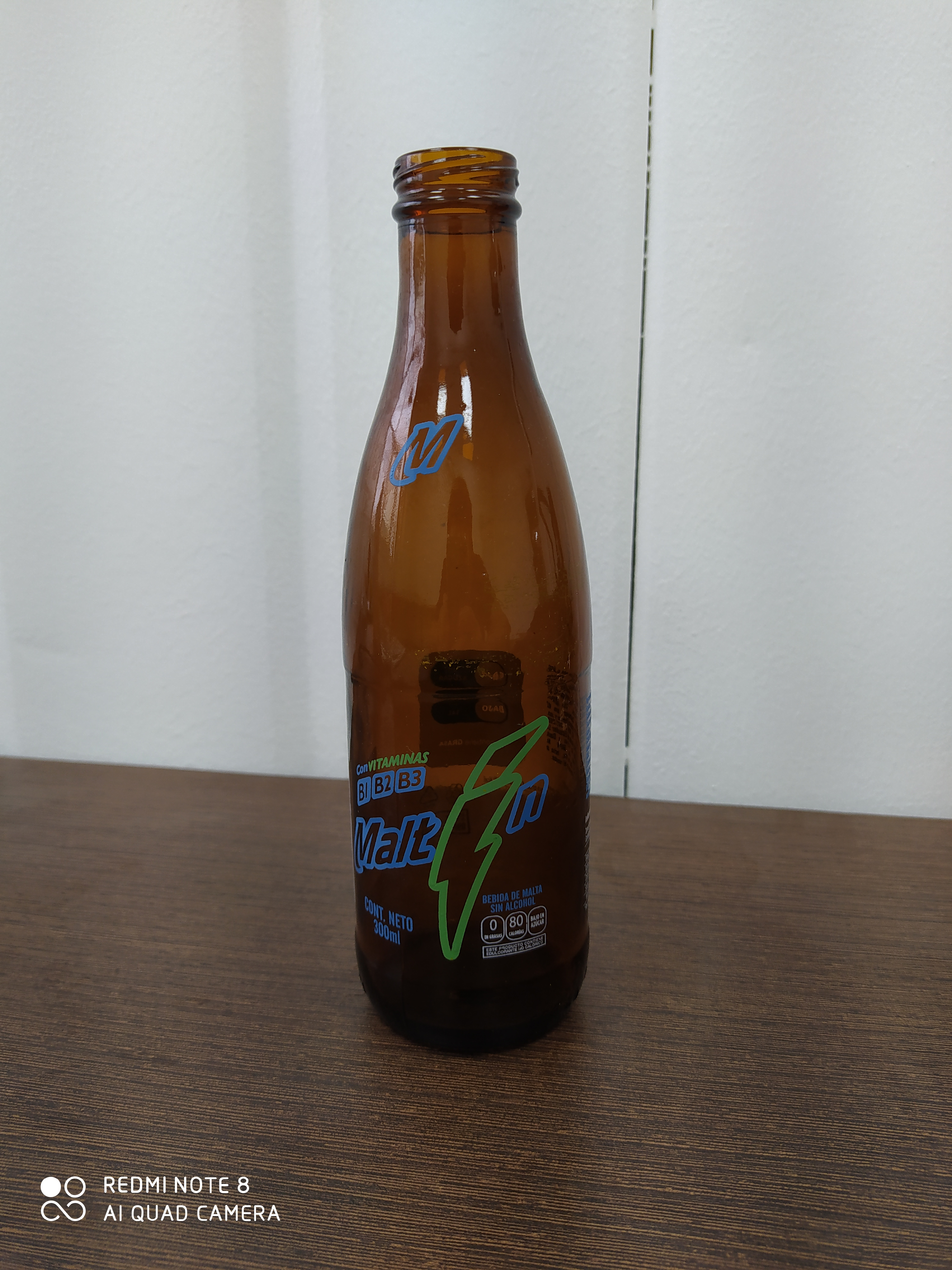 Maltin de 330 ml. Elaborado por Heineken Ecuador, en la ciudad de Guayaquil